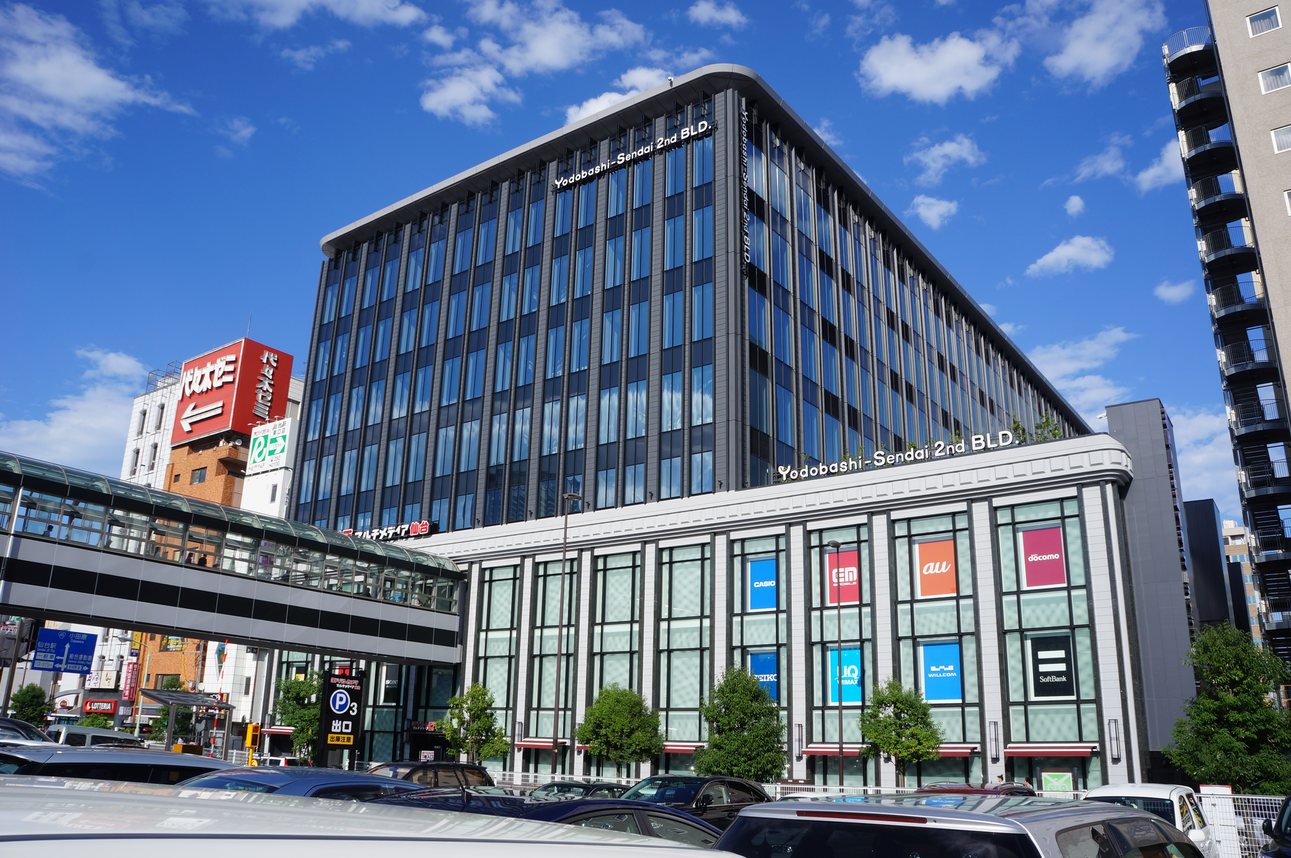 ヨドバシカメラマルチメディア仙台店